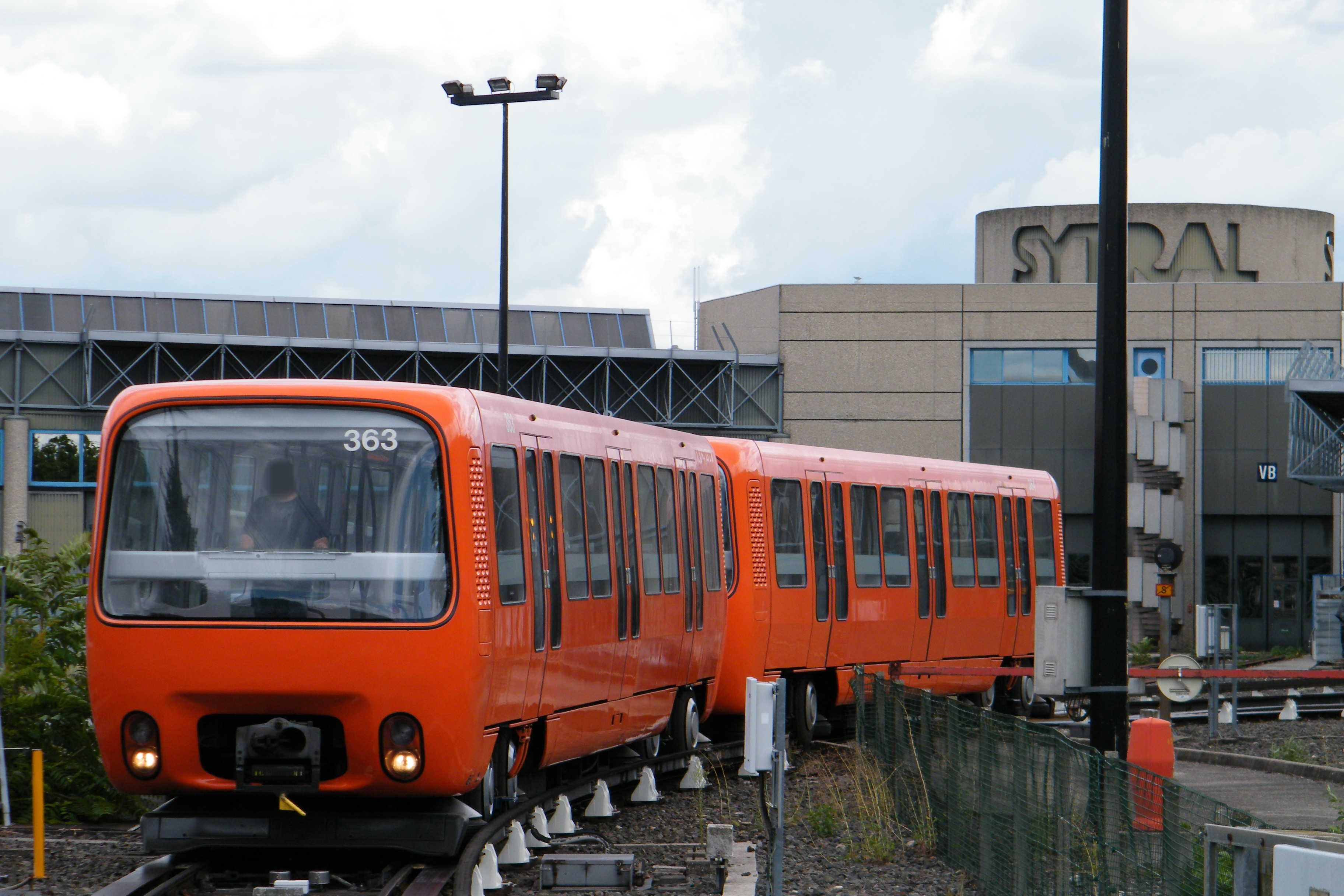 La rame n°32 de la ligne D du réseau TCL manœuvre dans les ateliers du Thioley.